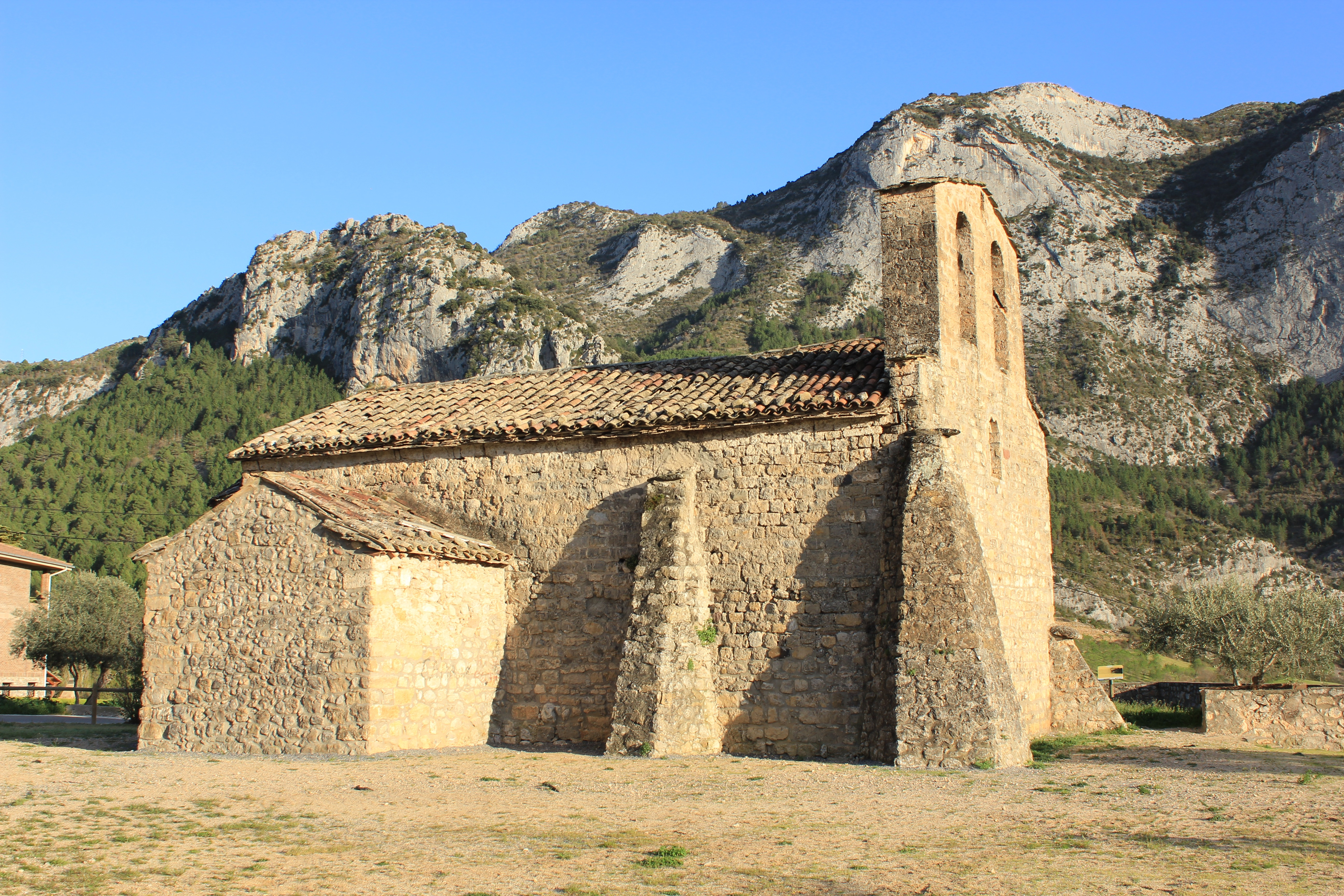 Església de Sant Víctor de Fígols (Fígols i Alinyà)